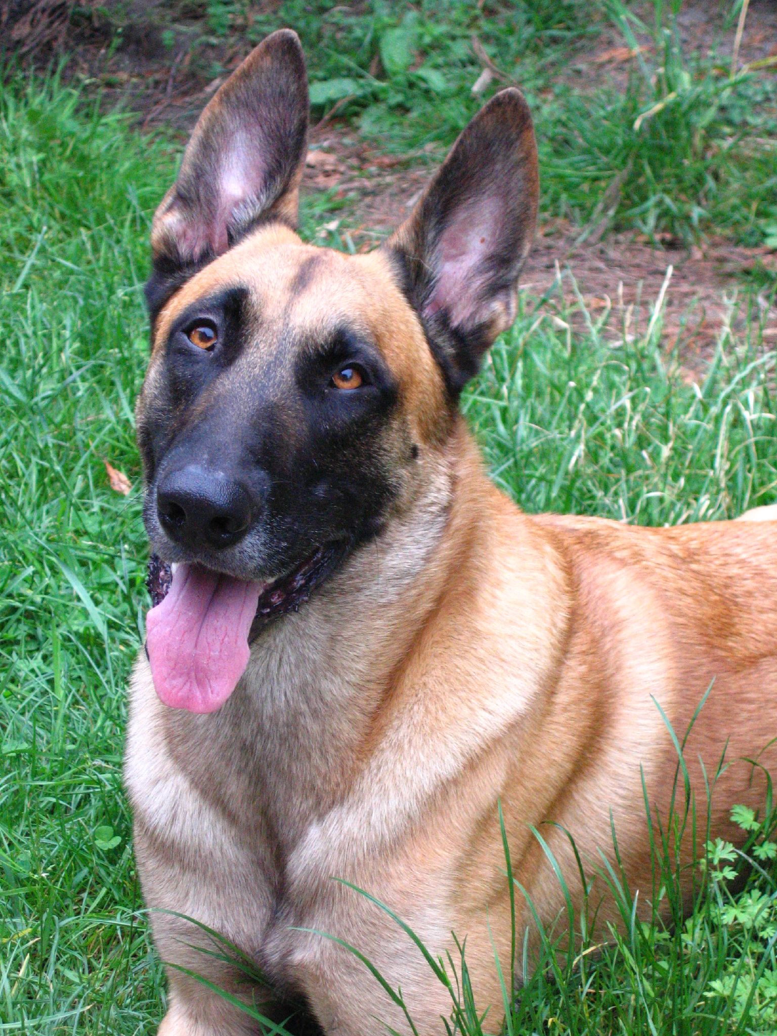 A male Belgian MalinoisMo